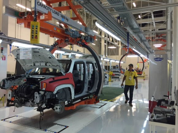 Fábrica da Fiat Chrysler Automobiles (FCA). Goina-PE